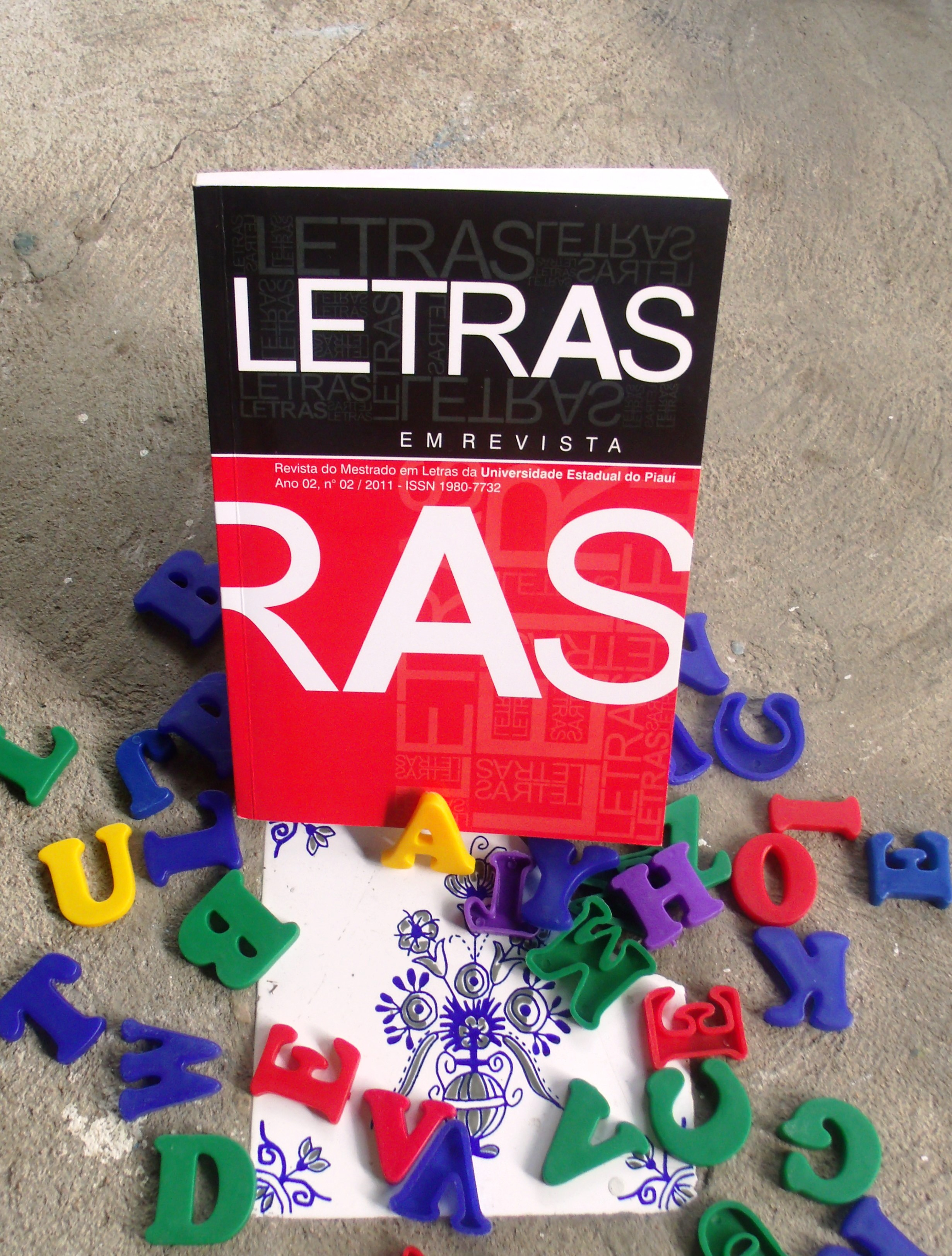 foto que fiz de uma uma revista do mestrado da Universidade Estadual do Piauí em cima de letrinhas coloridas.